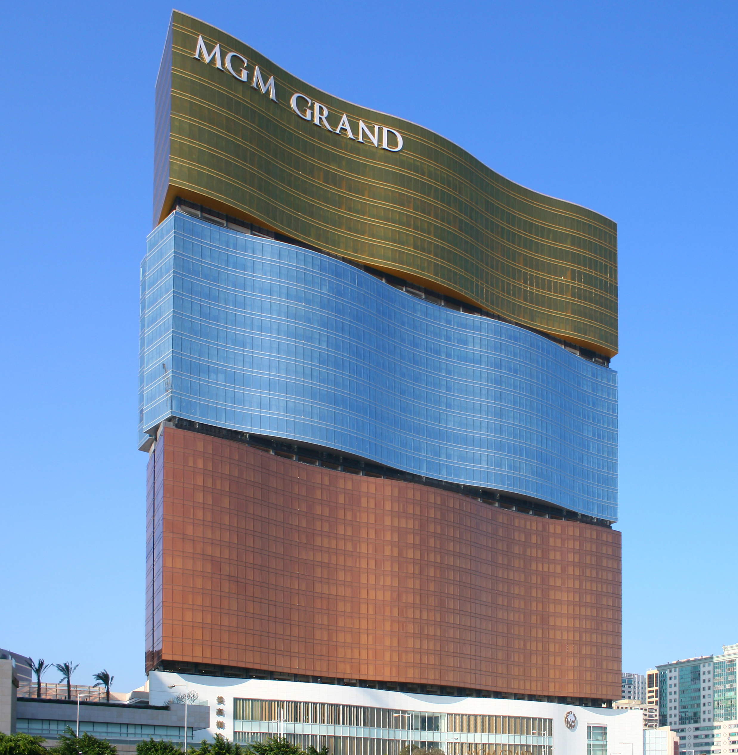 MGM Grand Macau 澳門美高梅金殿